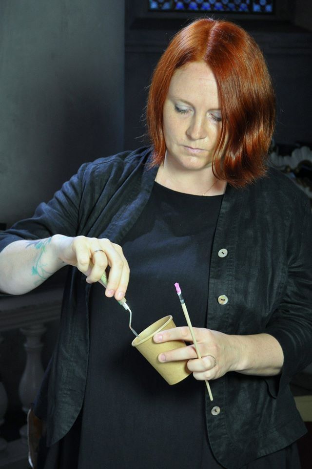 Mākslas performance "Vertikāle IV"